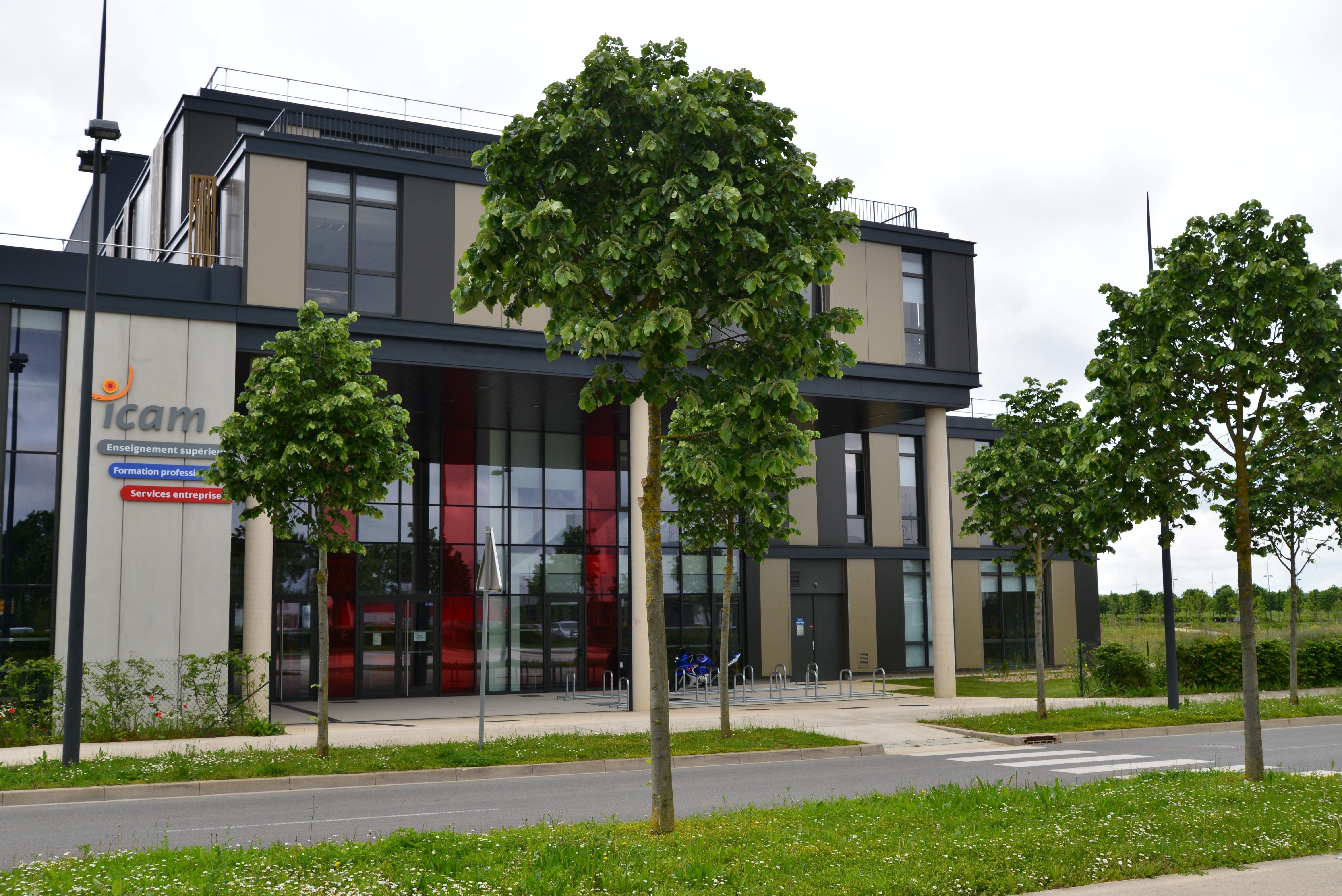 Institut Catholique des Arts et Métiers (ICAM) - Site de Paris Sénart.